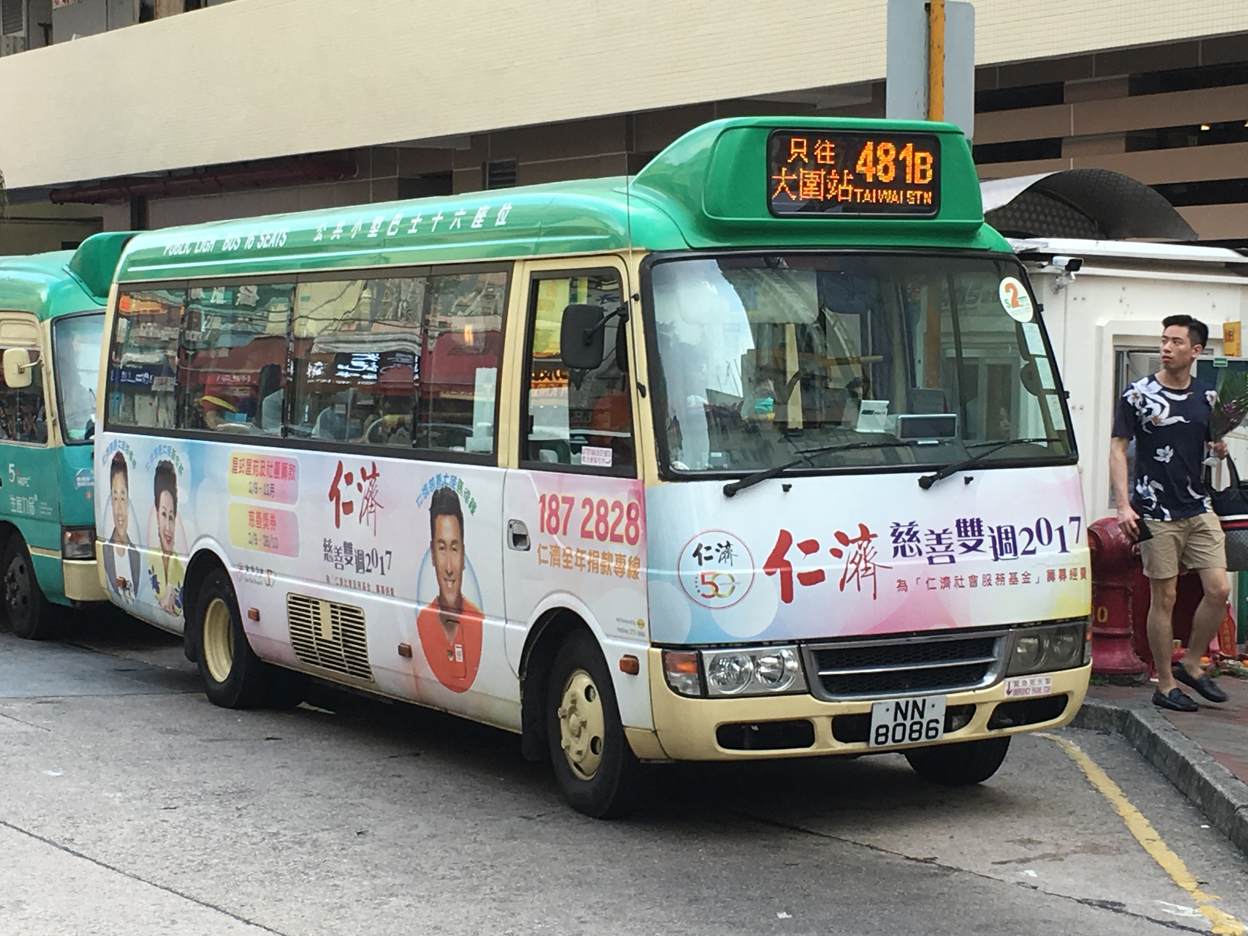 This photo is taken in Tsuen Wan.